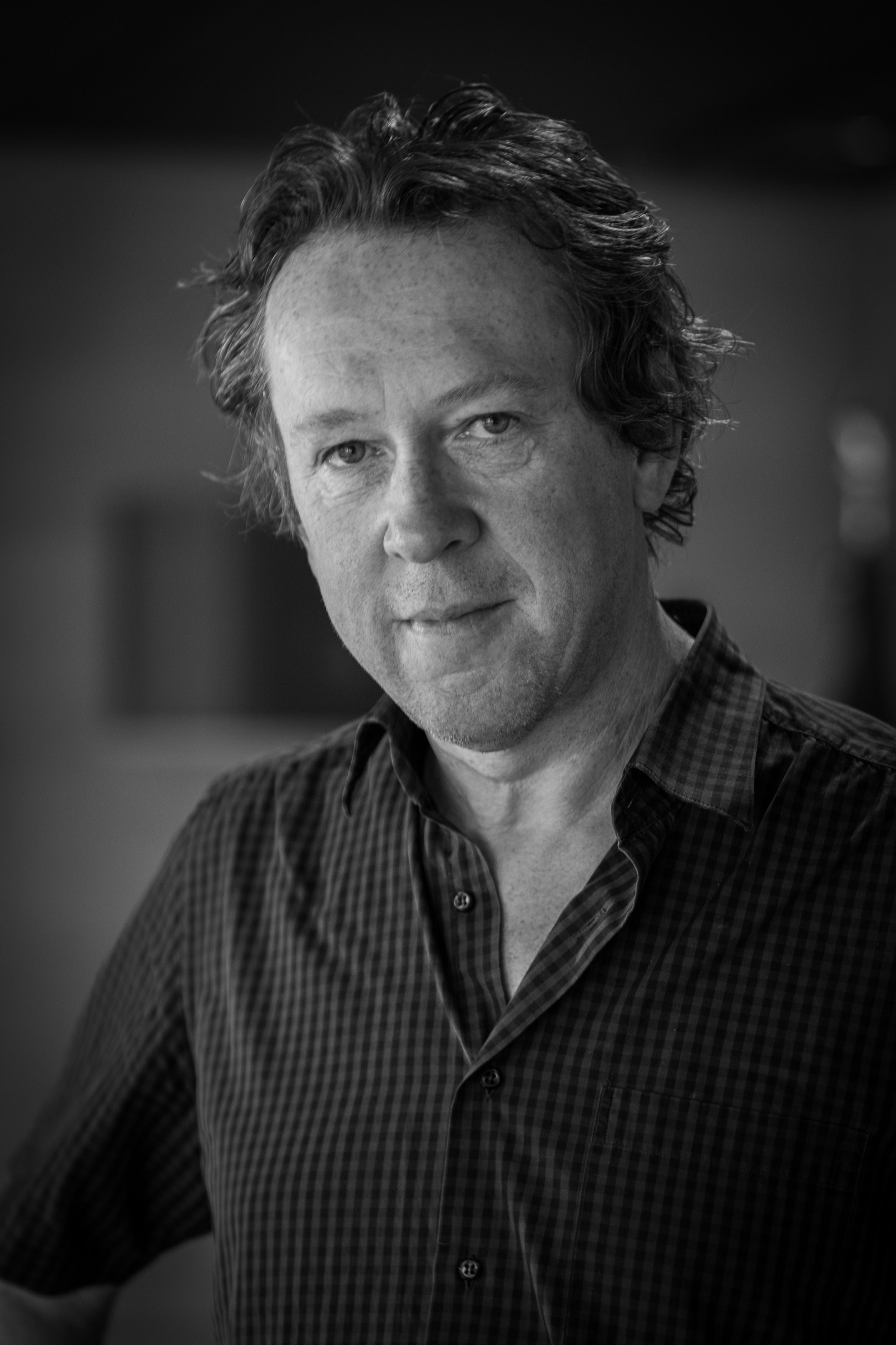 Benoît Duteurtre est un romancier, essayiste et critique musical français, né le 20 mars 1960 à Sainte-Adresse.